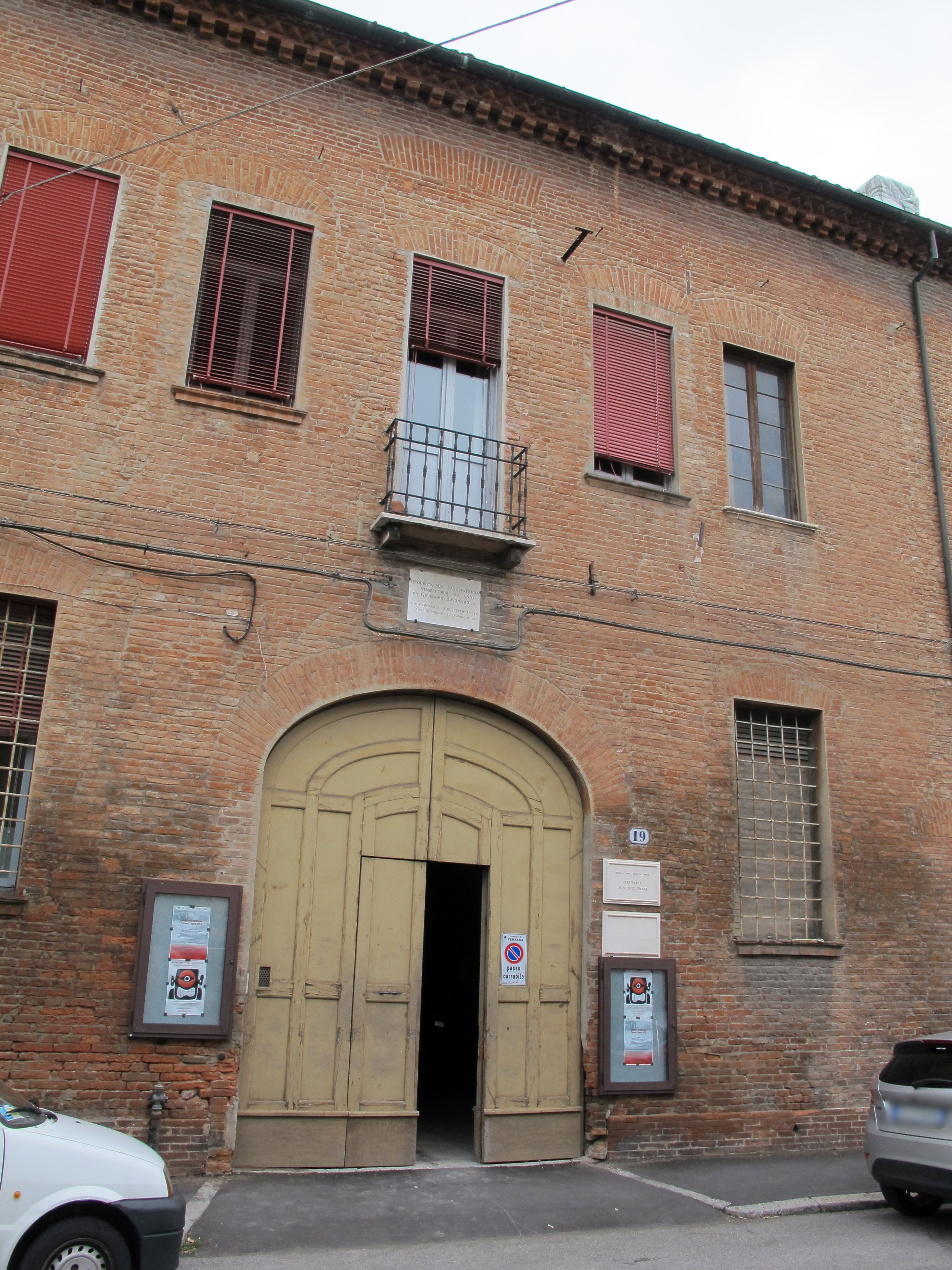 Ferrara